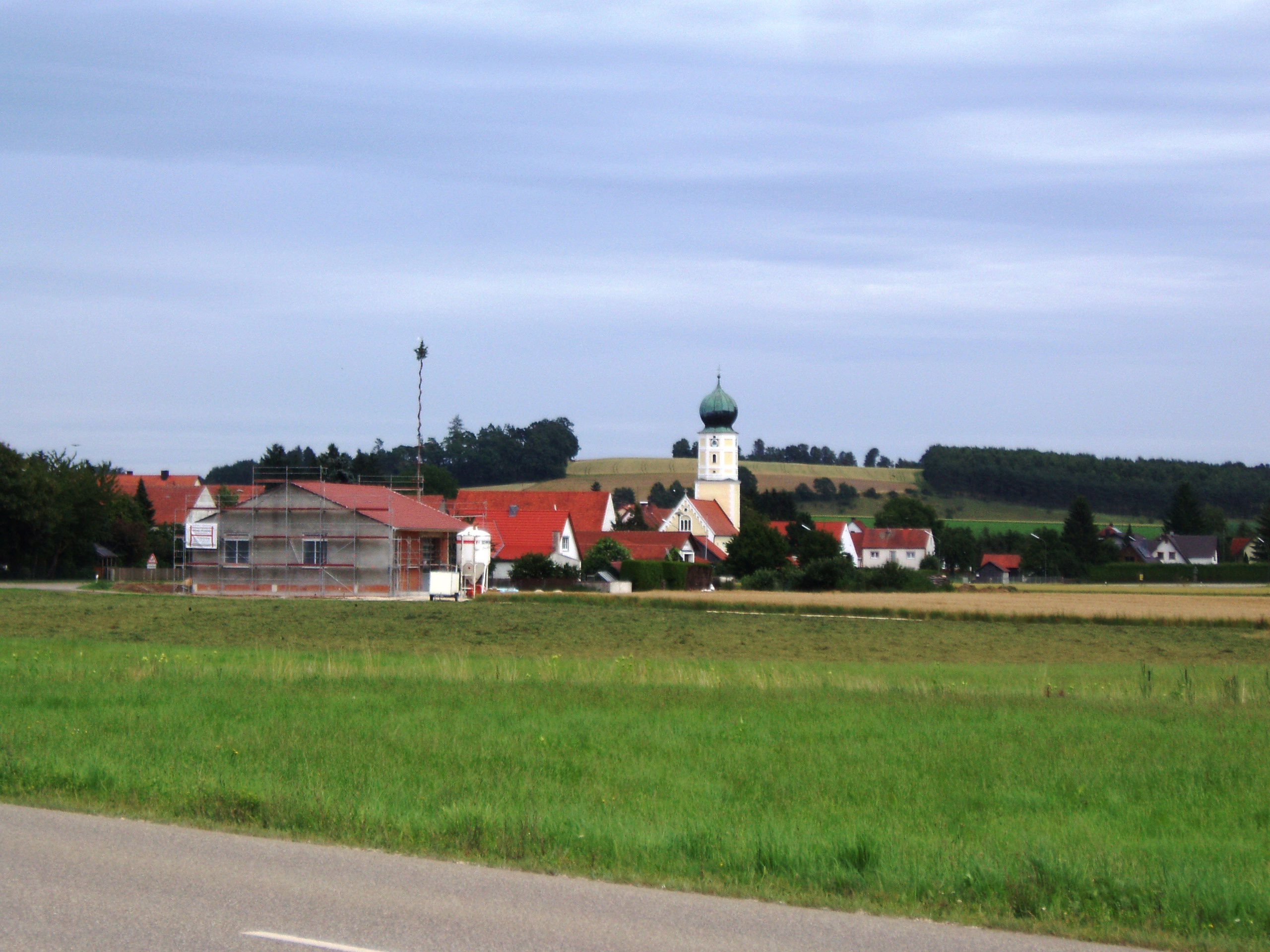 Unterdolling_im_Landkreis_Eichstätt